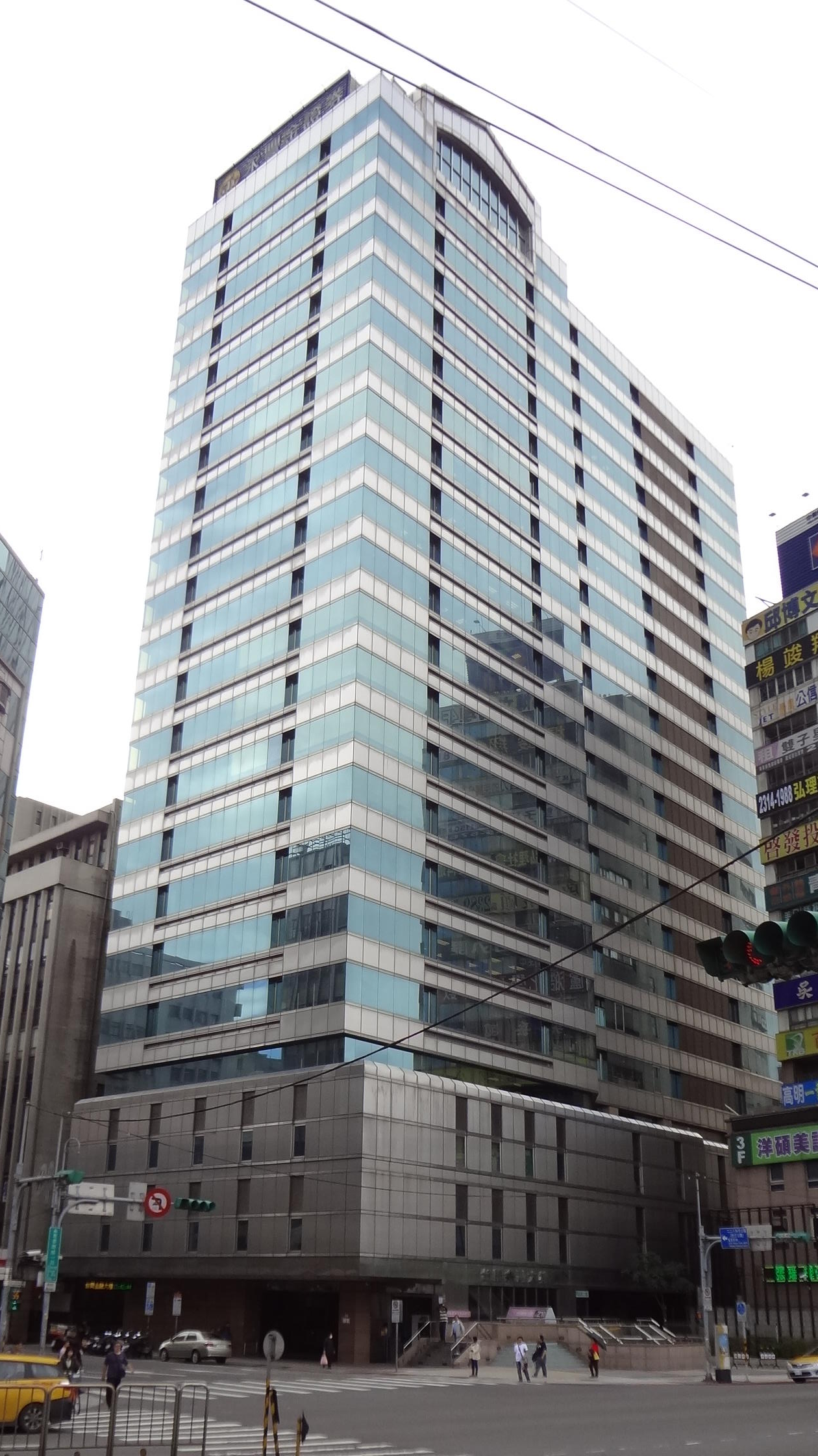 台開金融大樓，位於臺北市中正區重慶南路一段2號，永豐金證券總部設於此。